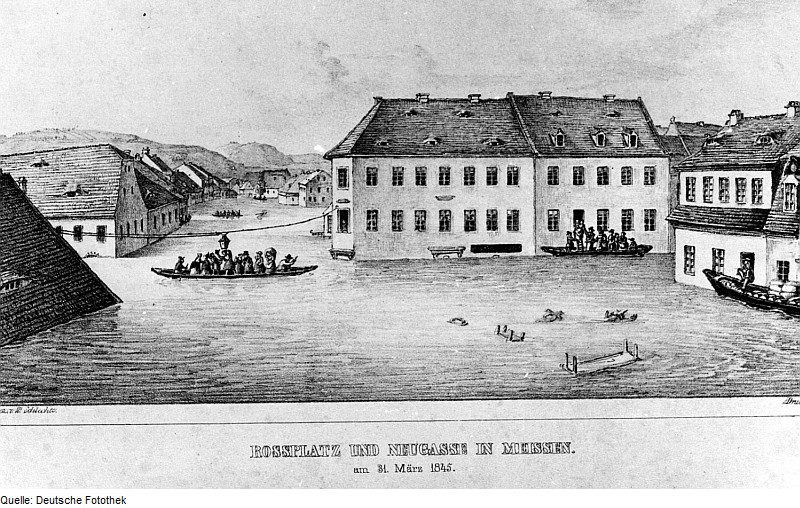 Original image description from the Deutsche Fotothek Meißen. Roßplatz und Neugasse, Hochwasser vom 31.03.1845 (Stadtarchiv Meißen)